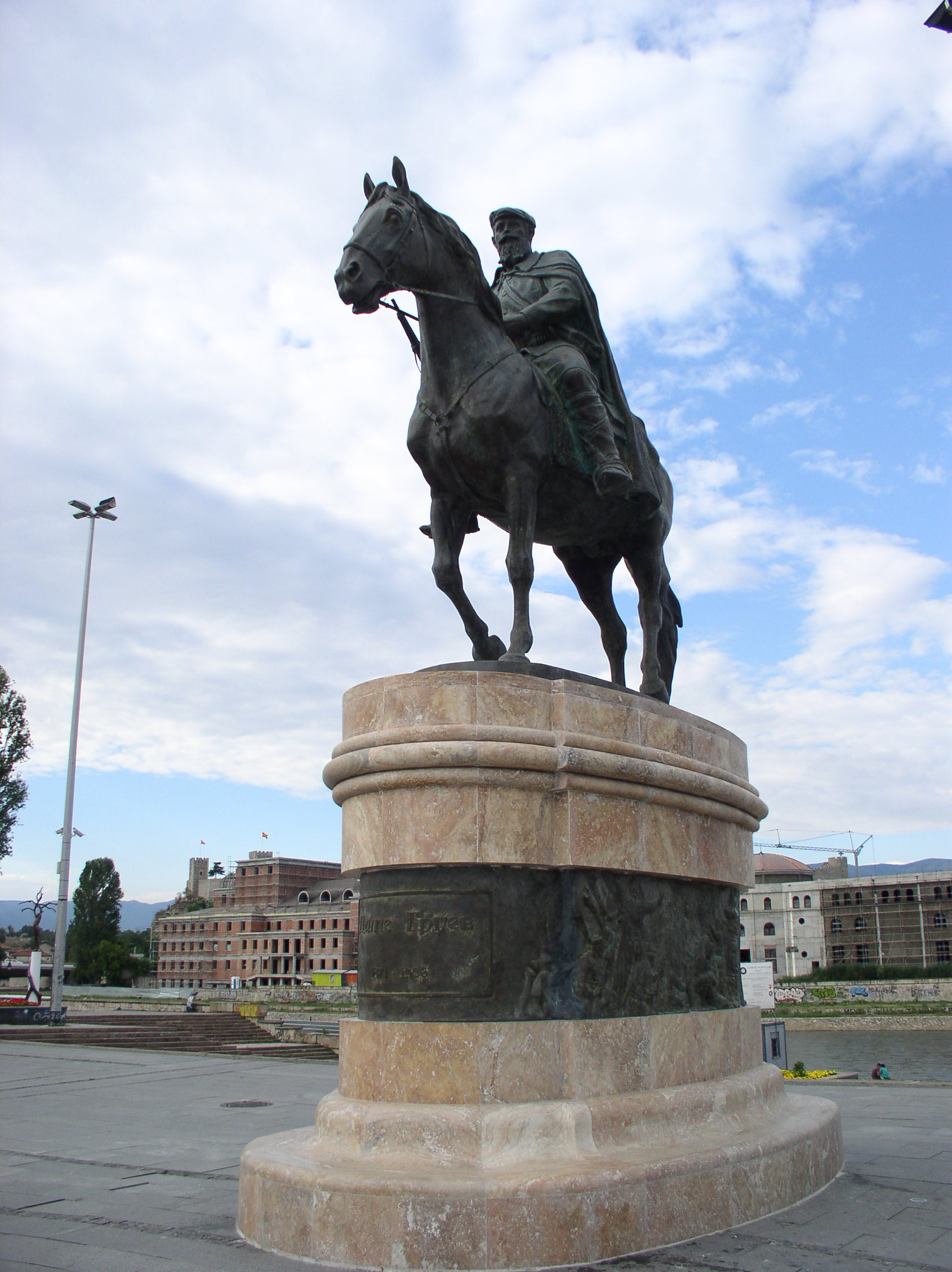 Споменик Груеву у Скопљу, у близини Каменог моста